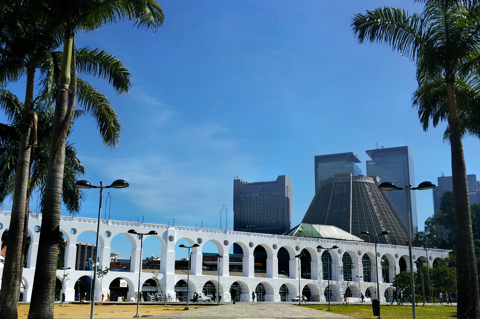 Arcos da Lapa ou Aqueduto da Carioca / Arcos da Lapa com a Catedral Metropolitana de São Sebastião do Rio de Janeiro ao fundo